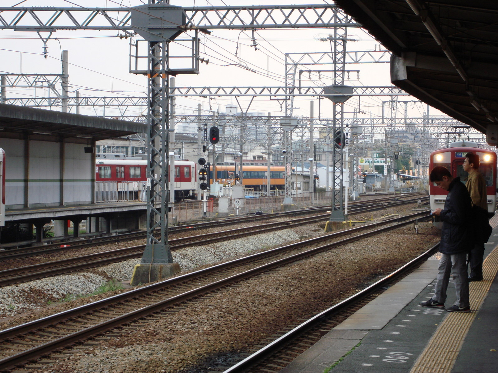 KawachiamamiSta.